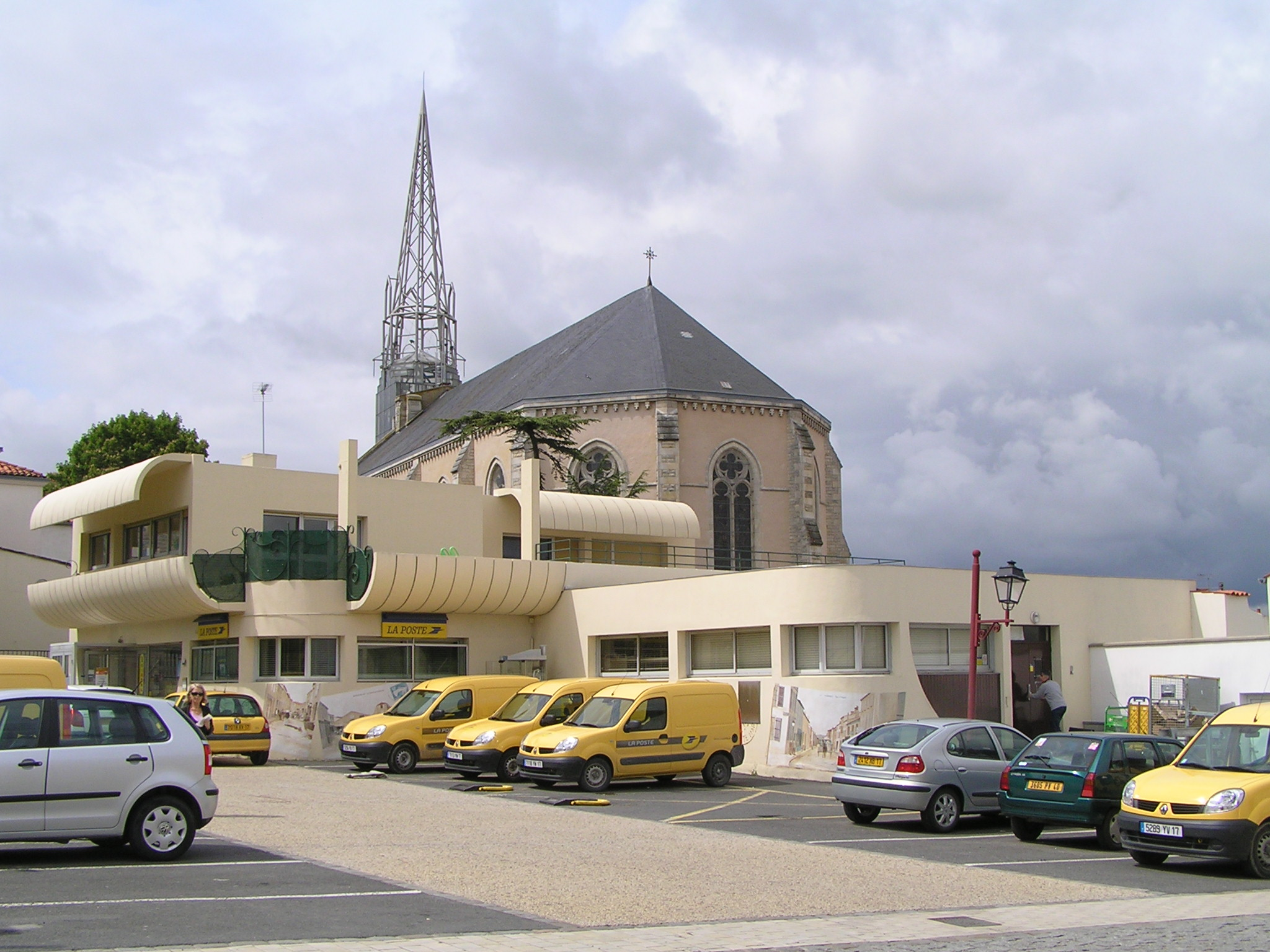 église notre-dame et poste de Marans en Charente-Maritime